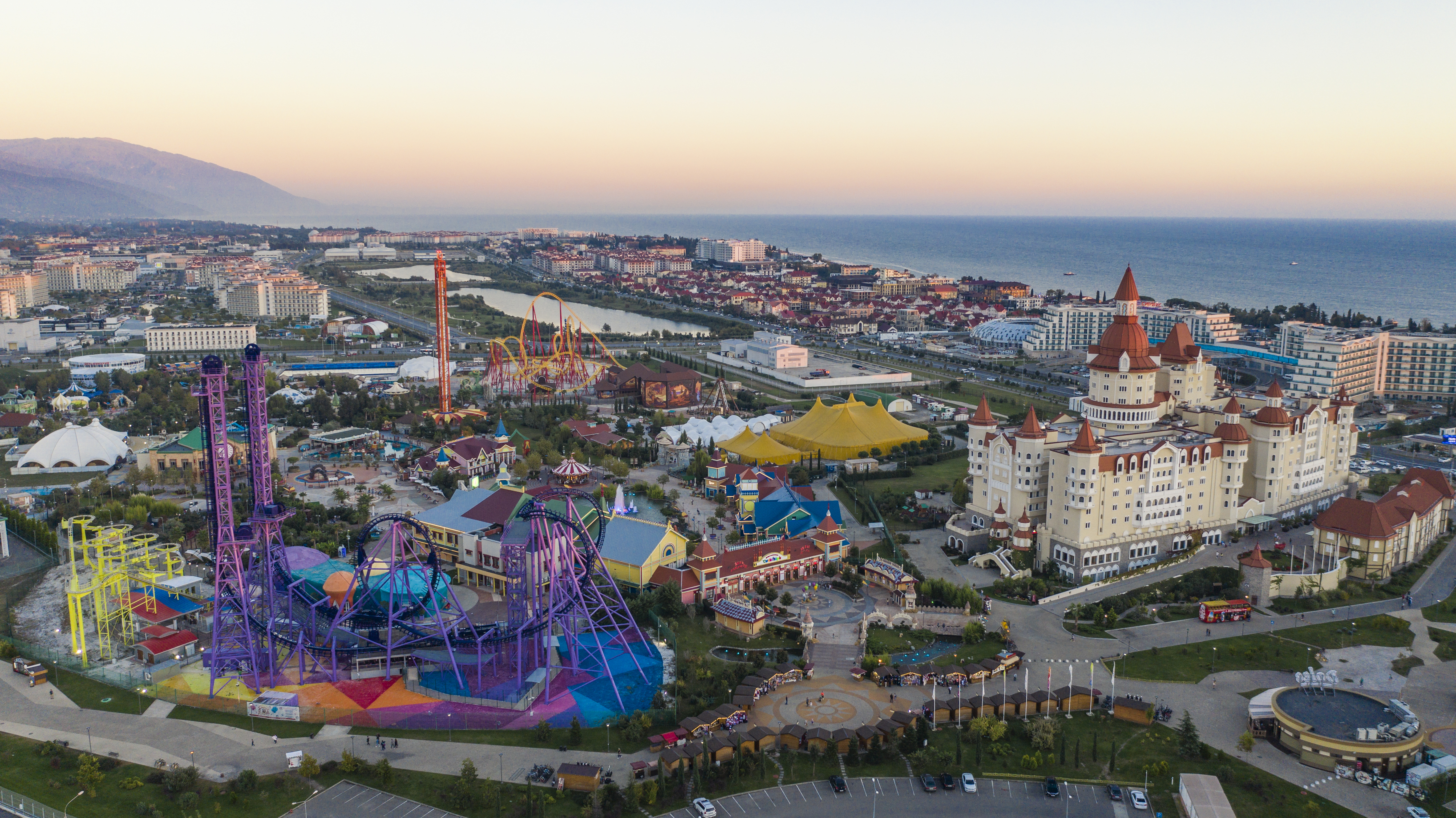 Blick auf den Sotschi-Park in Adler (Sotchi)